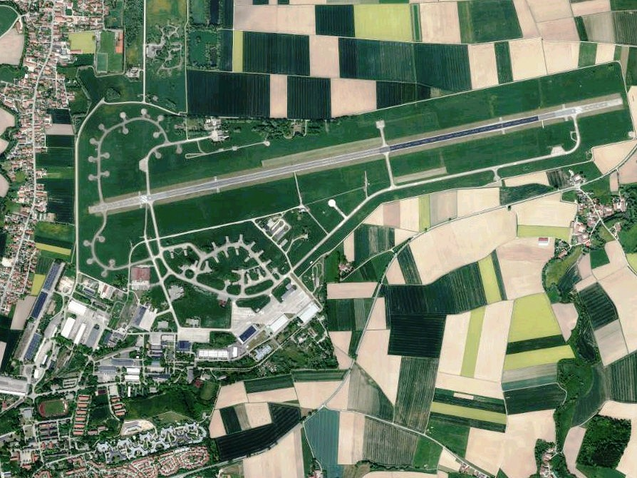 Luftaufnahme der Bayerischen Vermessungsverwaltung: Fliegerhorst Erding im Landkreis Erding, Bayern.